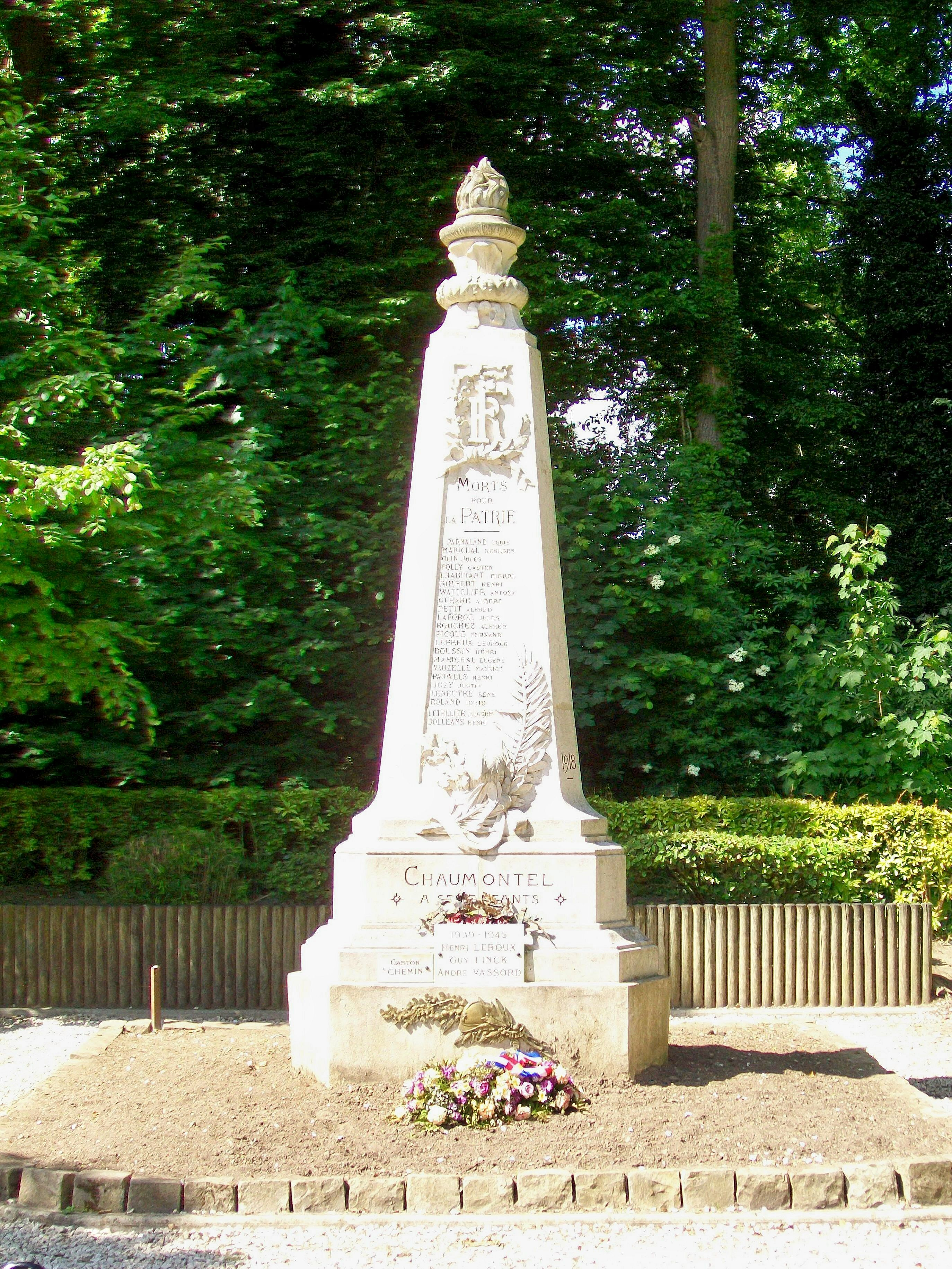 Le monument aux morts de la Première Guerre mondiale, au fond du parking en centre-ville (près de l'Ysieux, qui coule derrière les arbres).